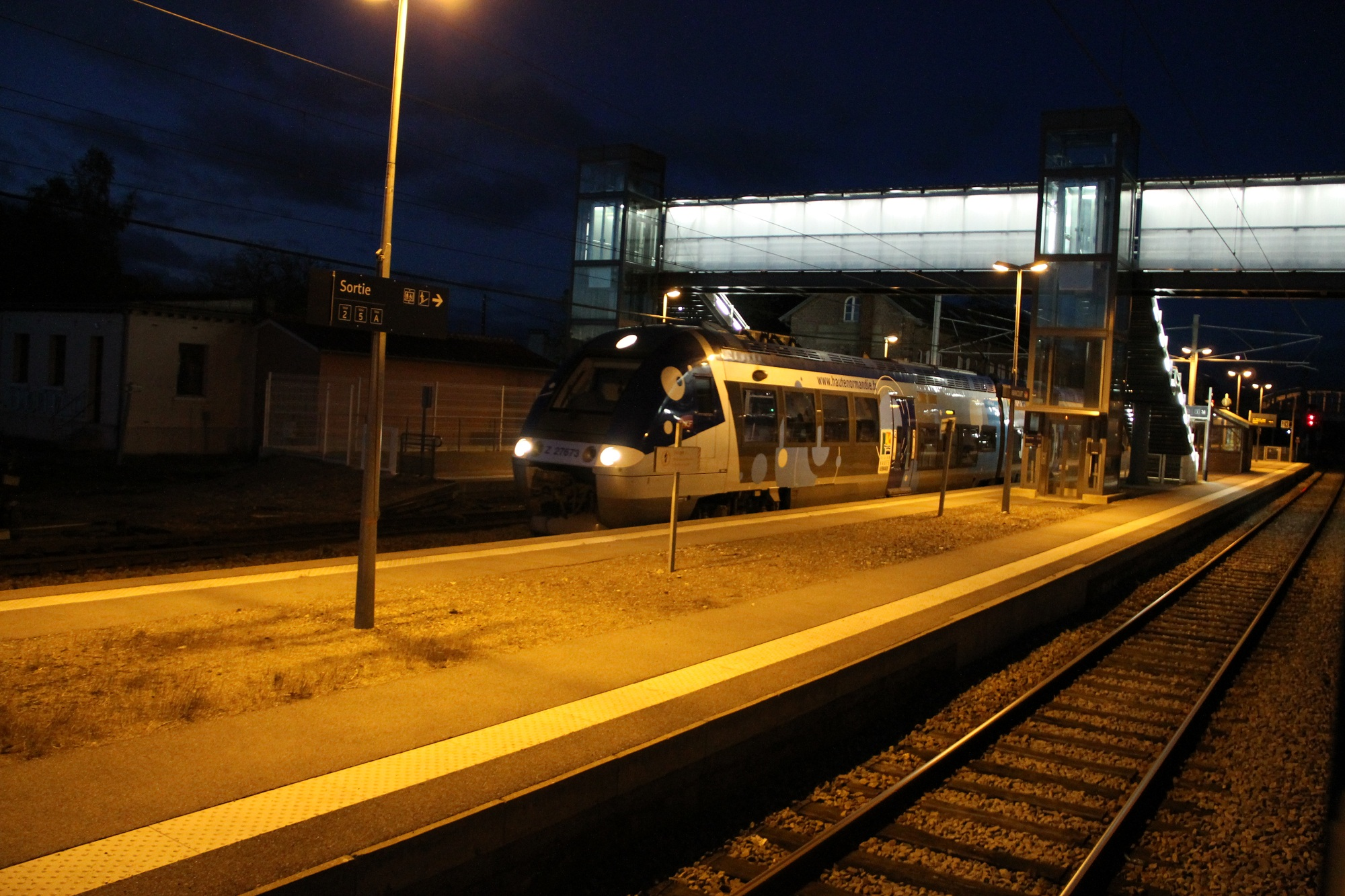 La gare d'Abancourt en novembre 2013.